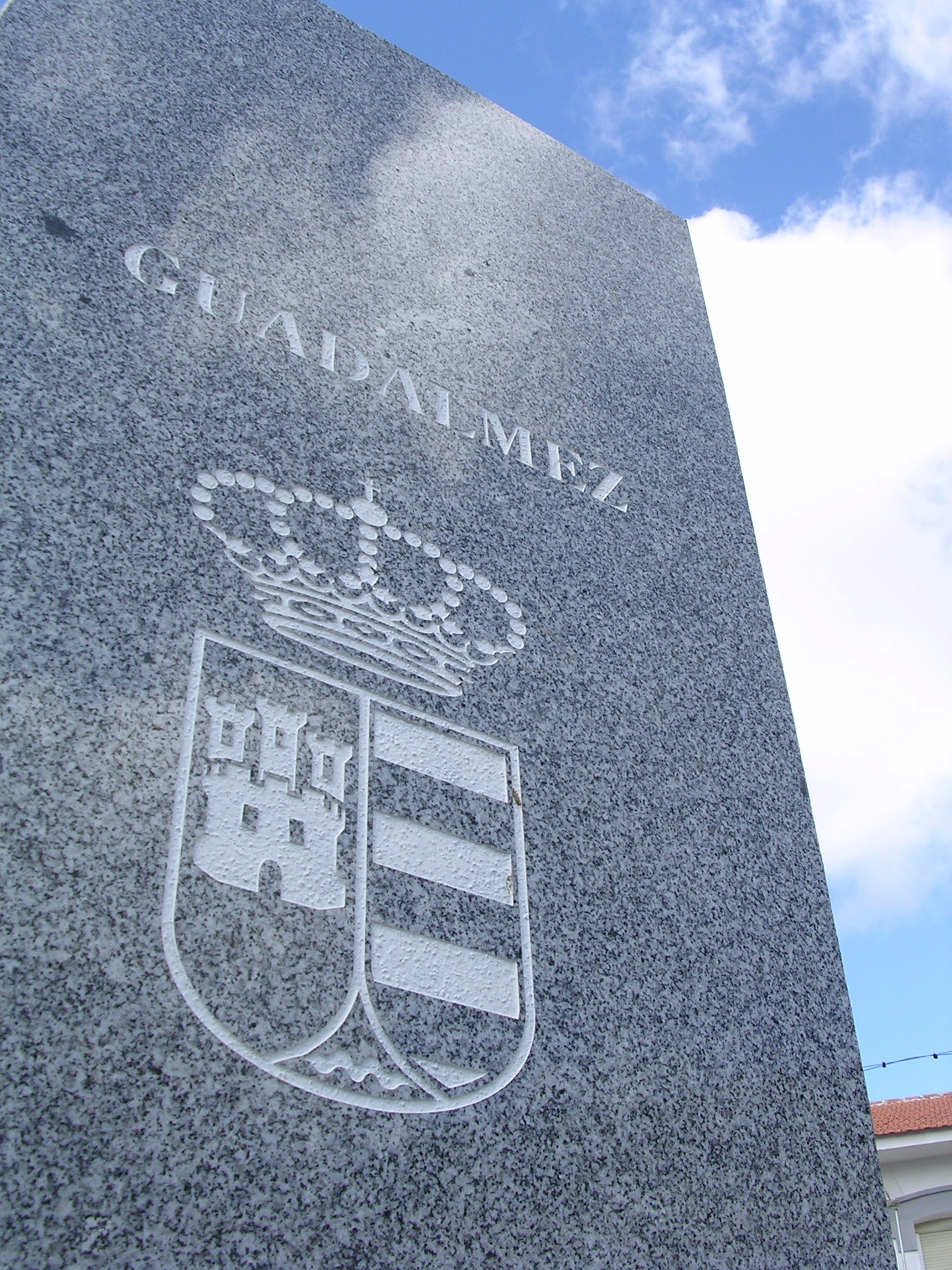 Monumento situado en la plaza mayor